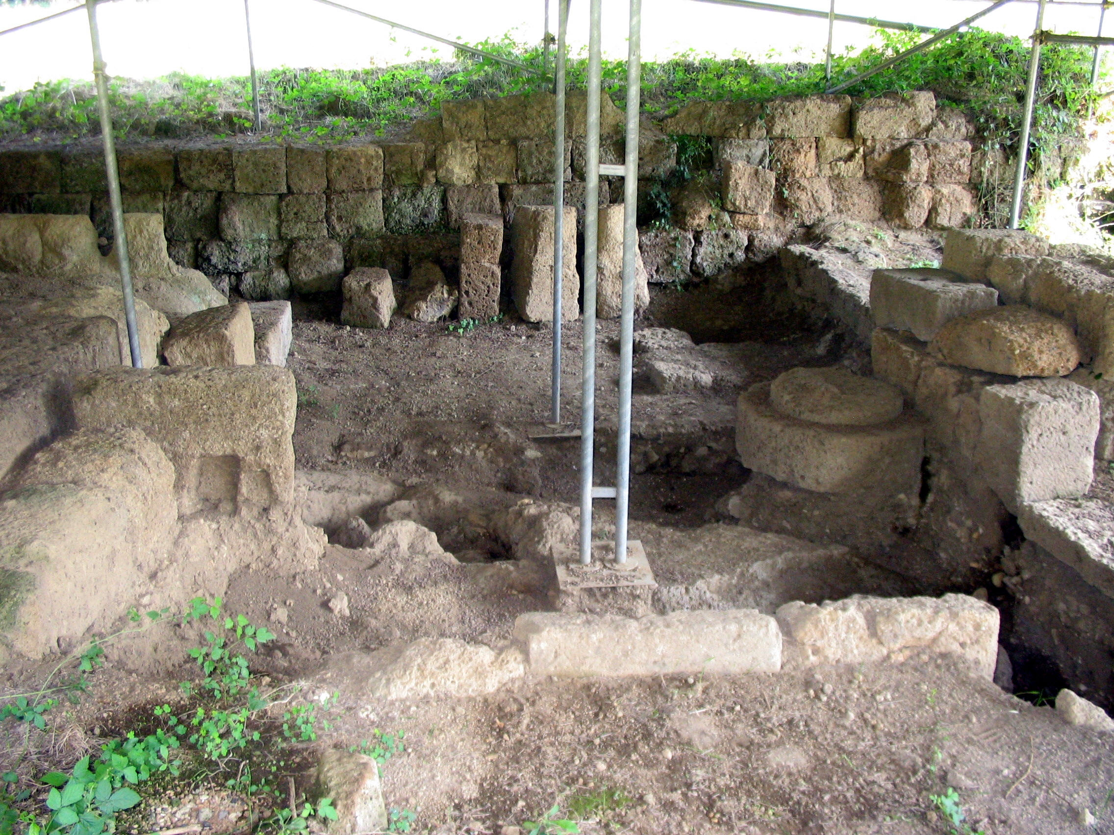 Narce, Valle della Treja, Lazio, Italia